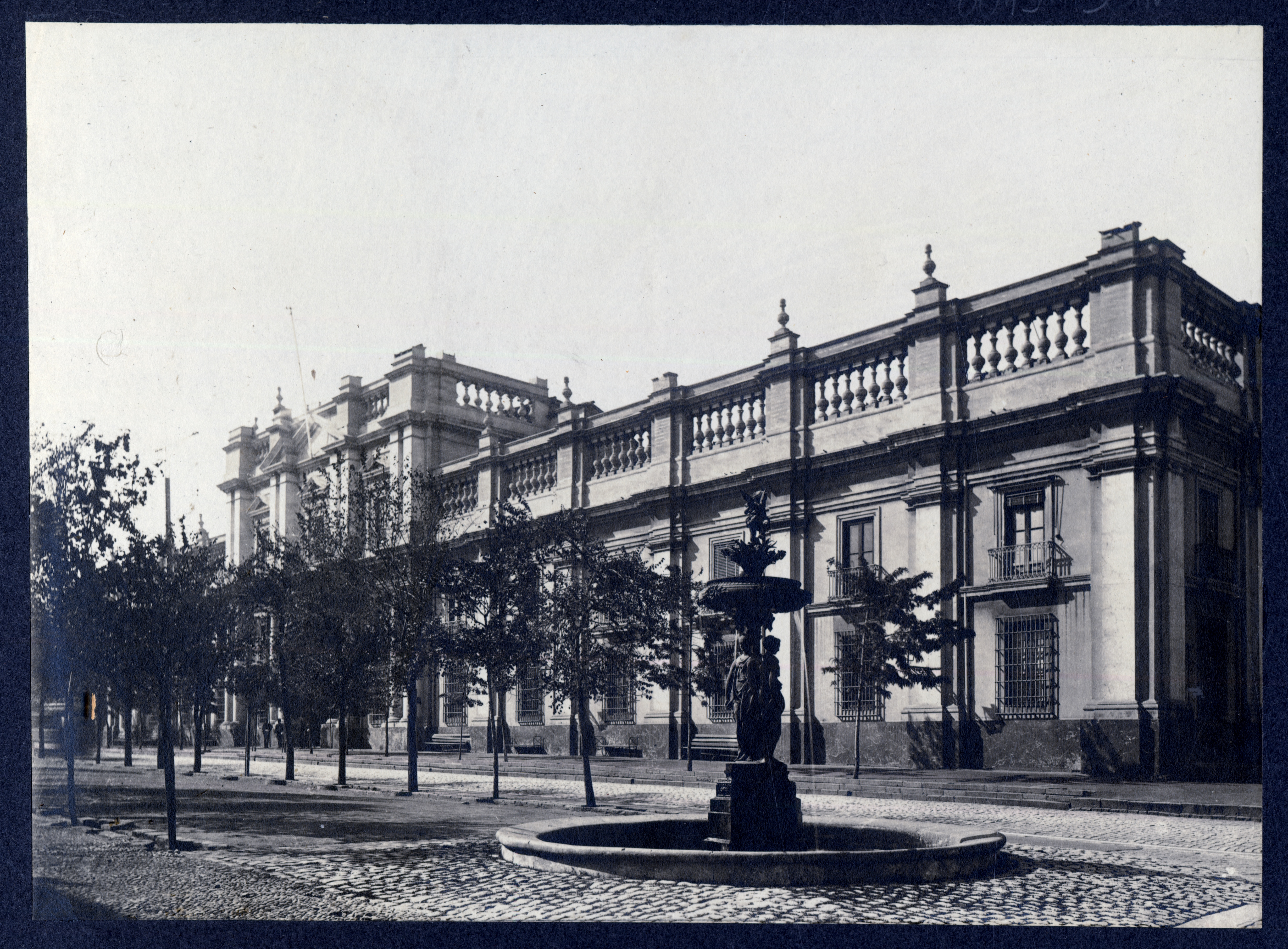 La Moneda, Santiago de Chile. Se aprecia la plazuela que había entre el palacio y el edificio que ocupó el Ministerio de Guerra; en primer plano, una de las dos fontanas de Las tres Gracias que había a cada lado de la estatua de Diego Portales. Este ultimo edificio fue demolido en los años 1930 para crear la actual plaza de la Constitución.